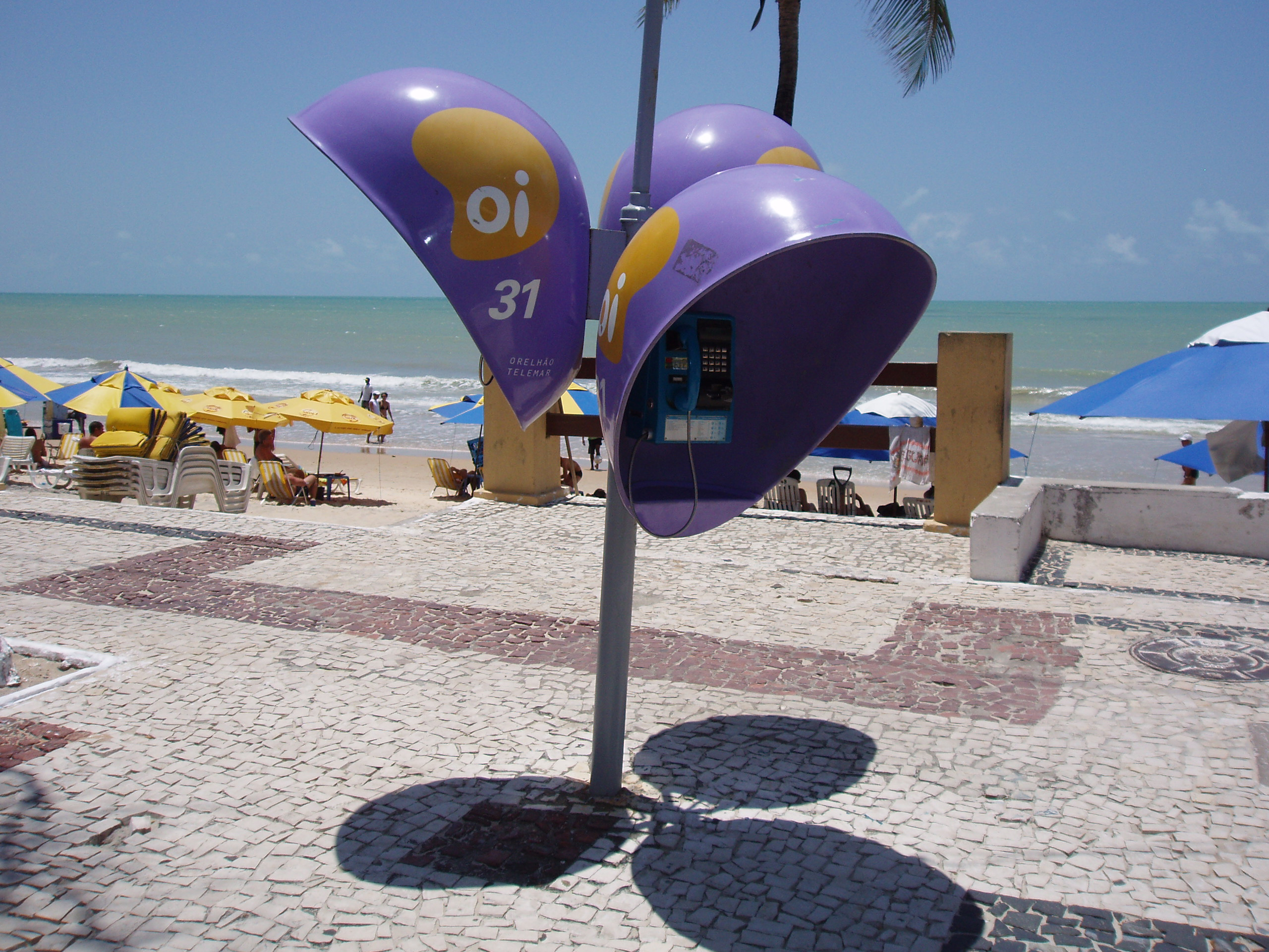 public telefon at Av. Erivan França - Beira-mar - Ponta Negra - Natal (RN) Brazil